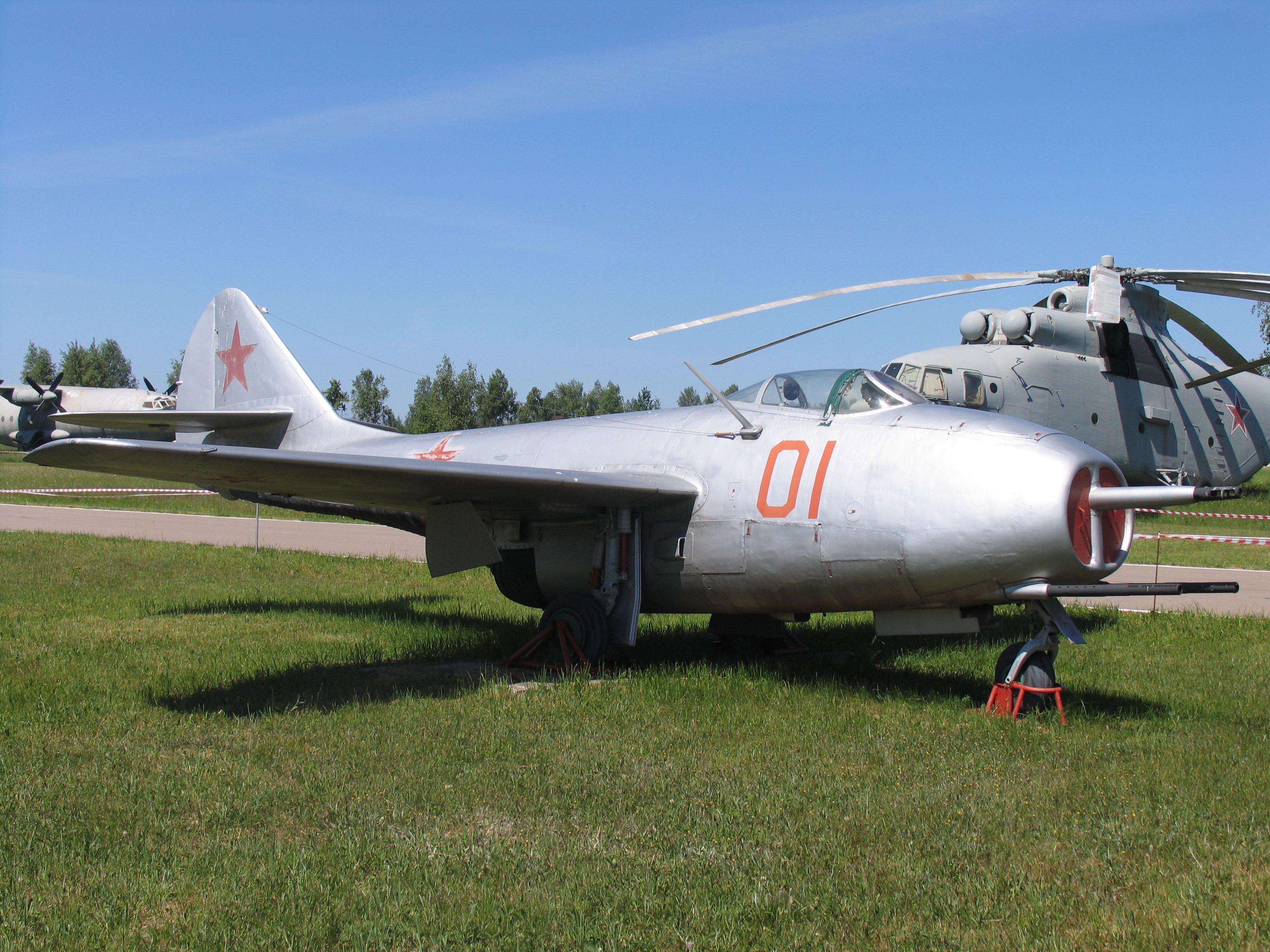 МиГ-9. Музей ВВС.